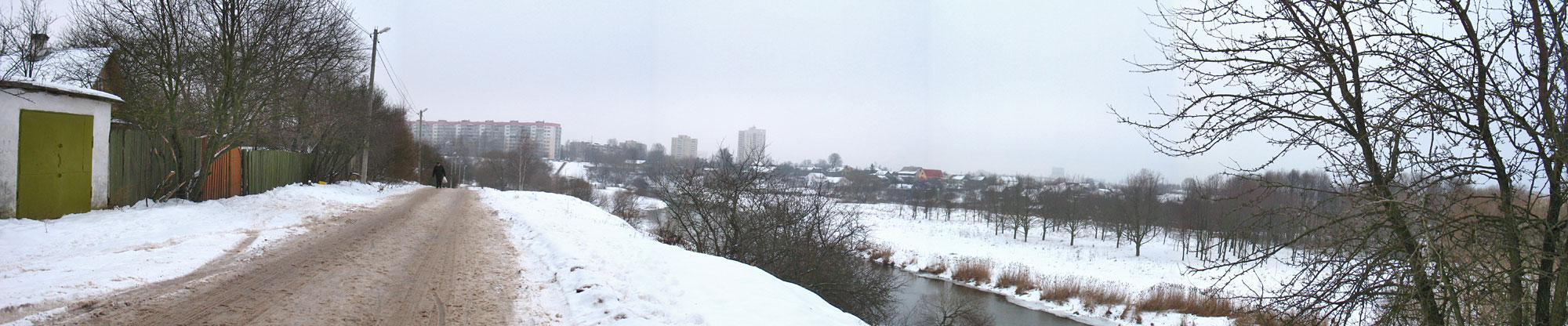 Šepičy st. in Miensk, Шэйпічы, Шэпічы